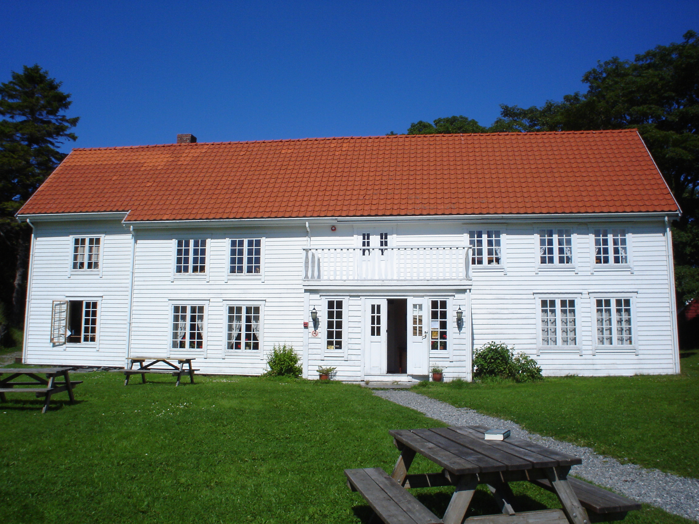 Hovudhuset Herøy Gard